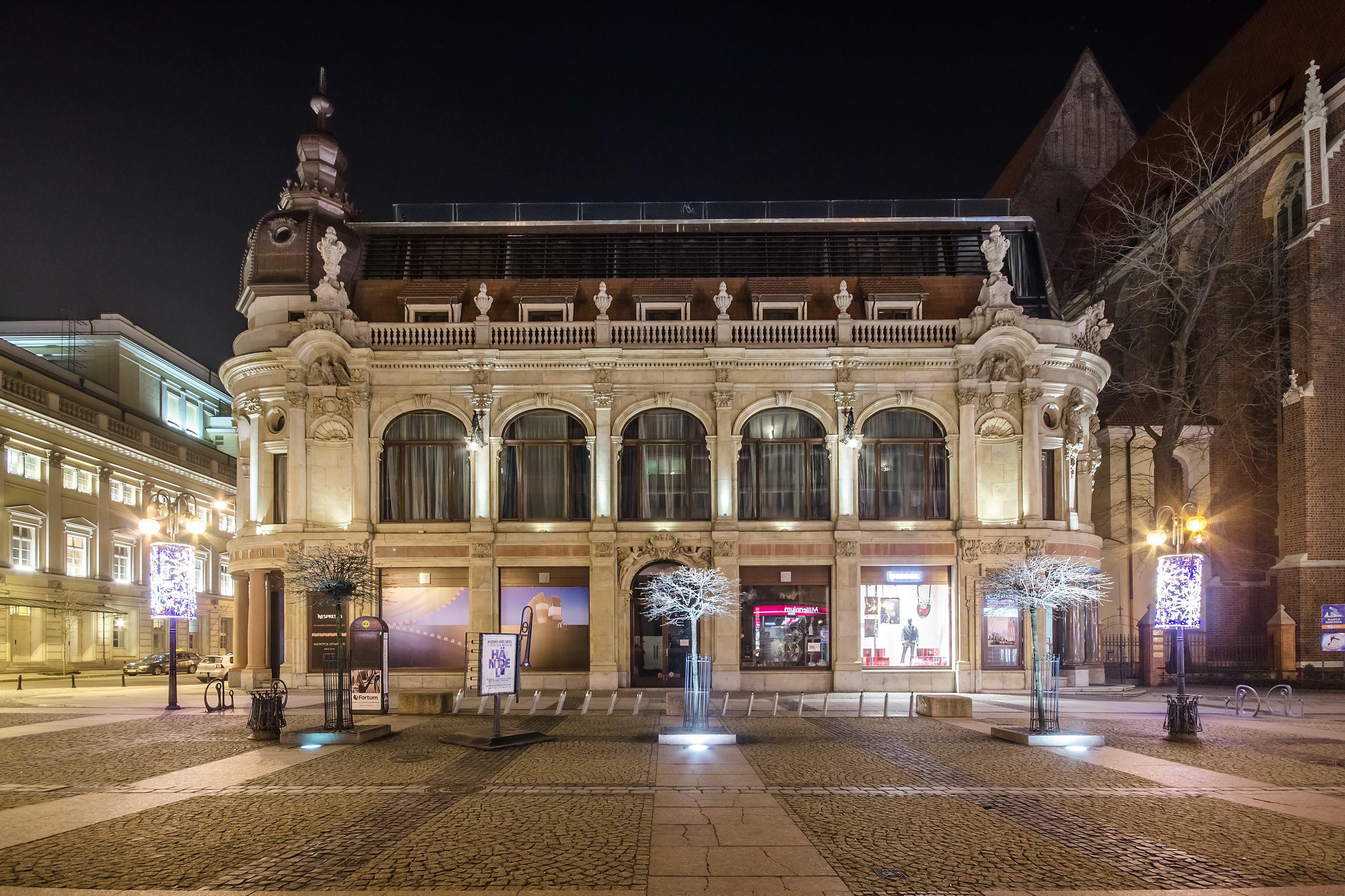 Wrocław, hotel "Monopol", 1890-1892, 1894-1905